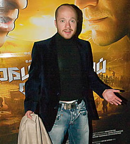 Евгений Стычкин на премьере фильма “Обитаемый остров: СХВАТКА”